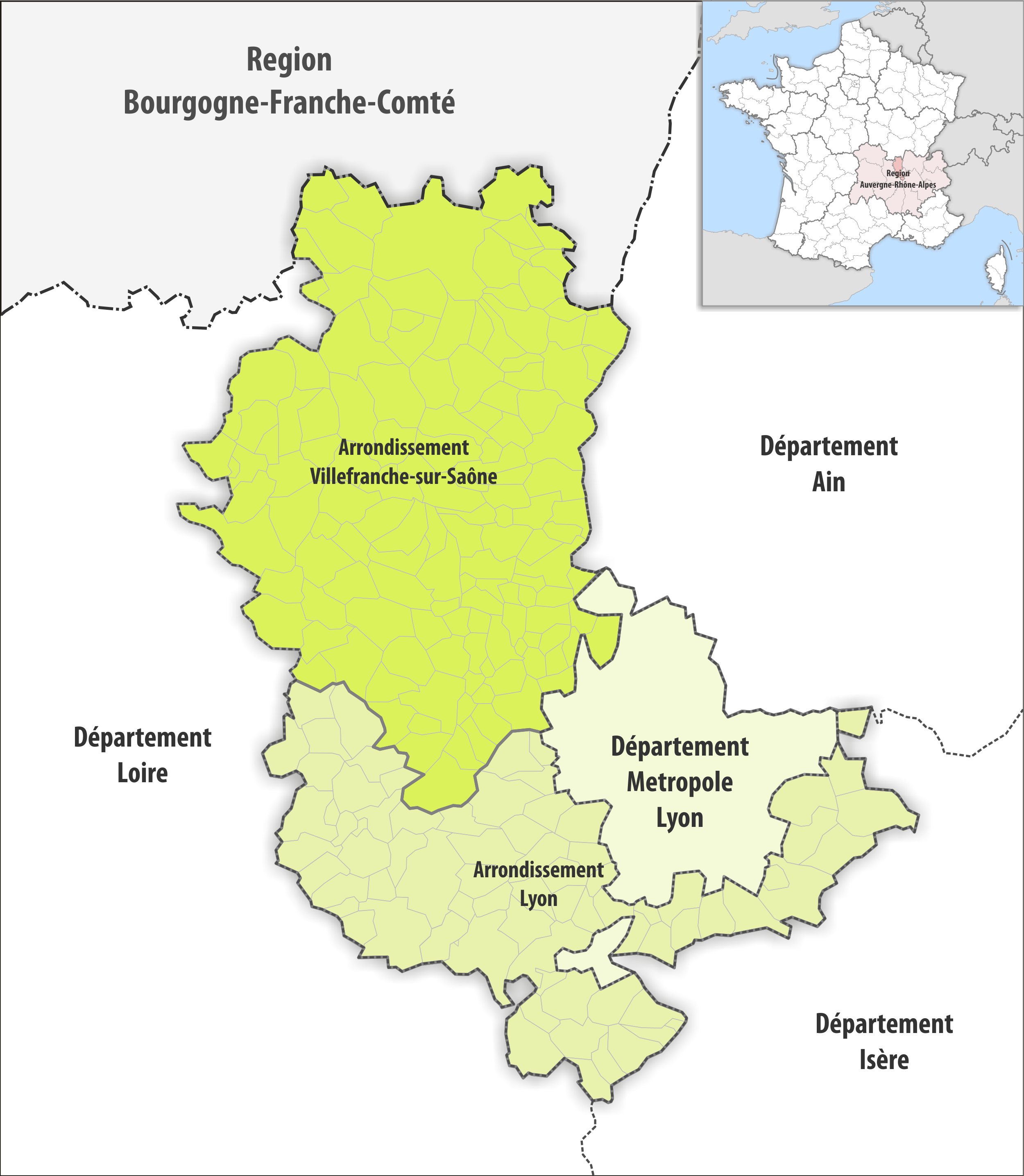 Gemeinden und Arrondissemente im Departement Rhône